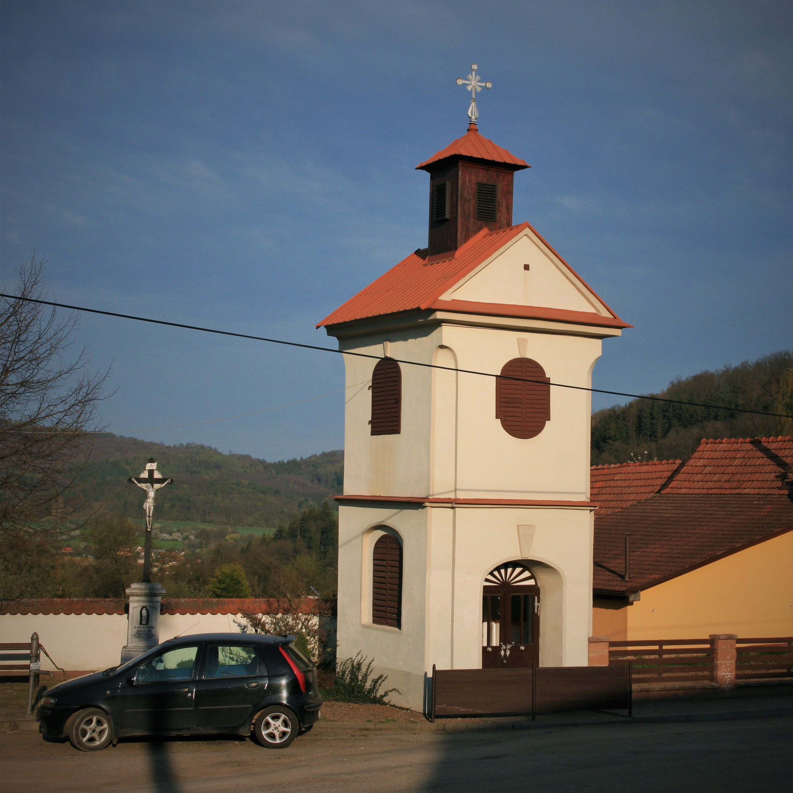 Vesnice Řepka, část městysu Lomnice v okrese Brno-venkov. Kaple s křížem na návsi.